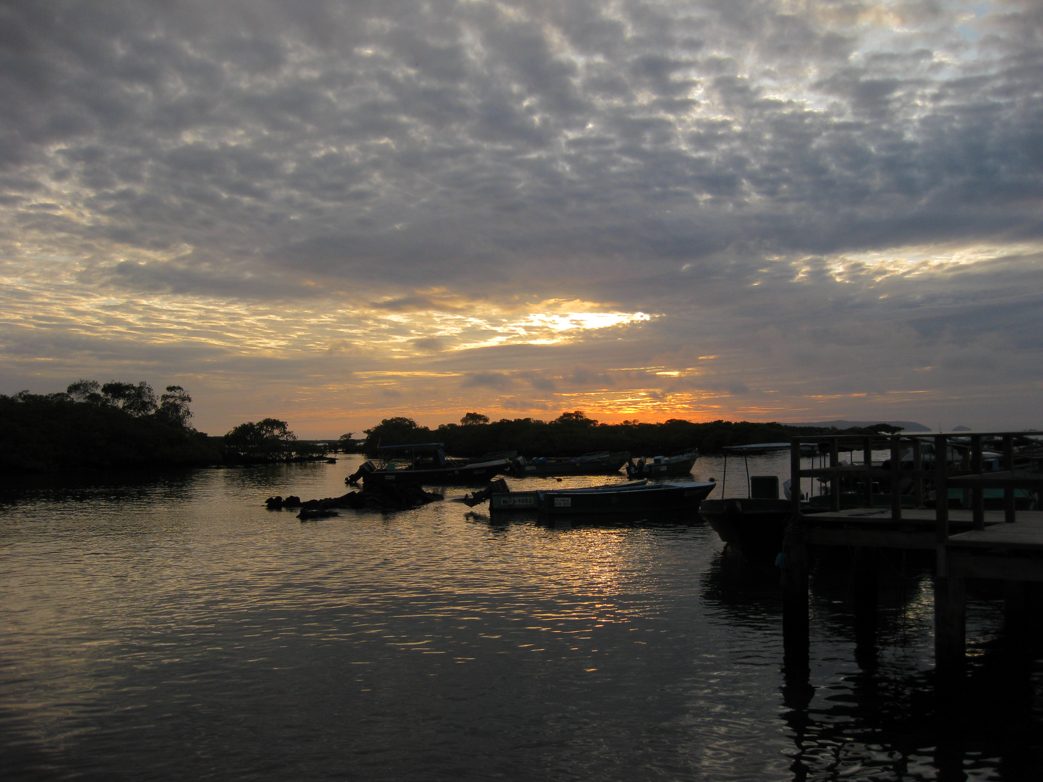 Puerto Villamil, Galapagos